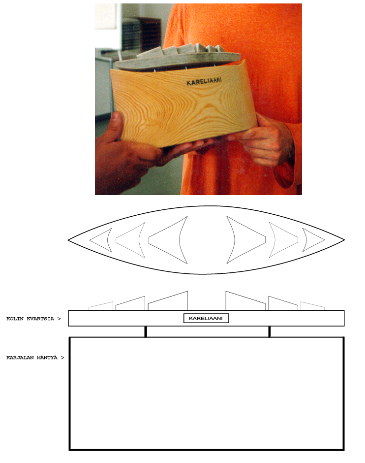 vuorineuvos S. A. Tervon 1995 perustama palkinto. Palkinnon suunnittelija kiviseppä artesaani Sami Hokkanen.